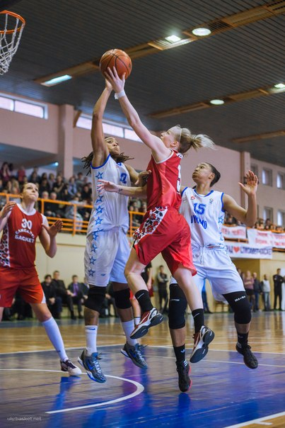 "Динамо-НПУ" - "Елисавет-Баскет" 73:60